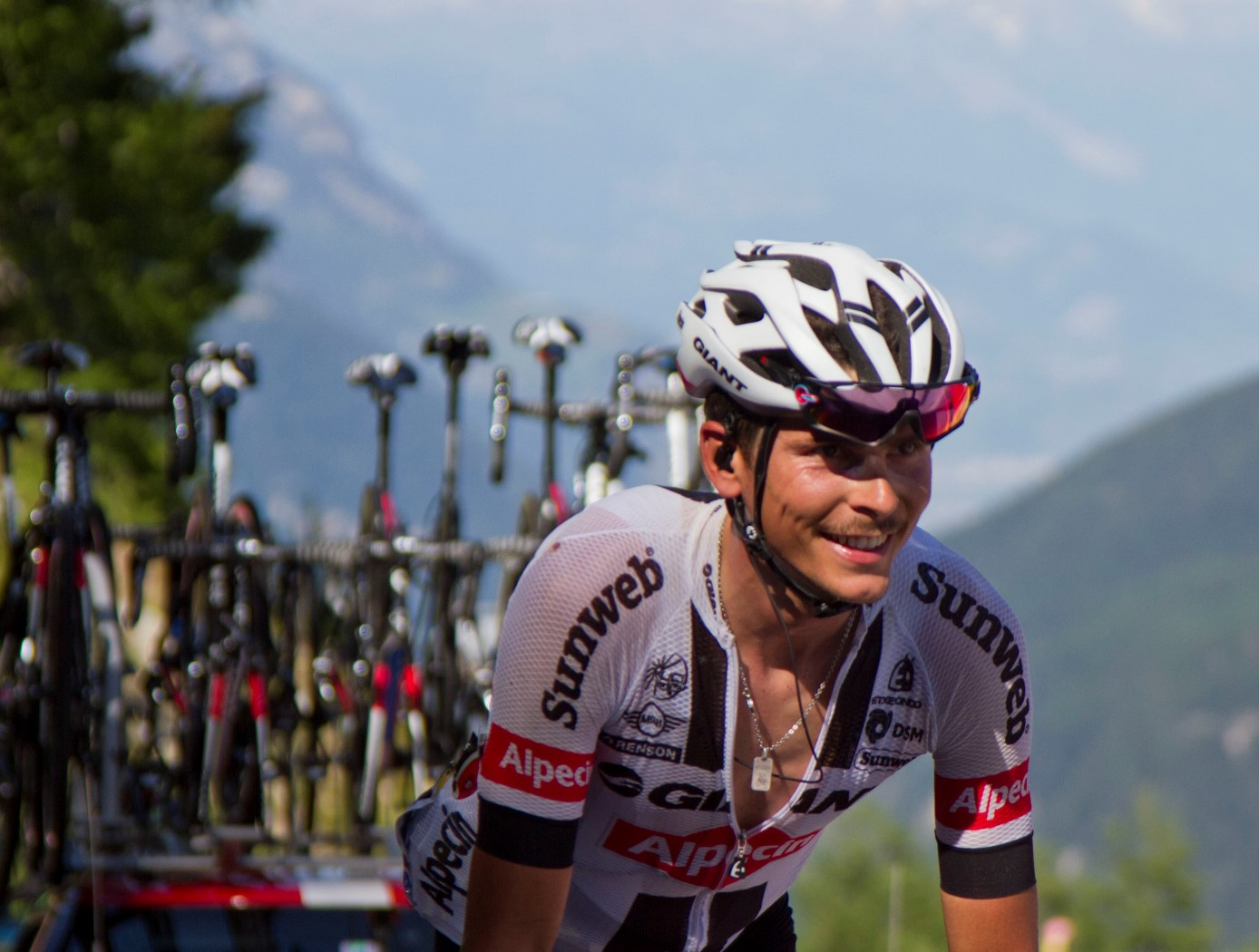 299 barguil